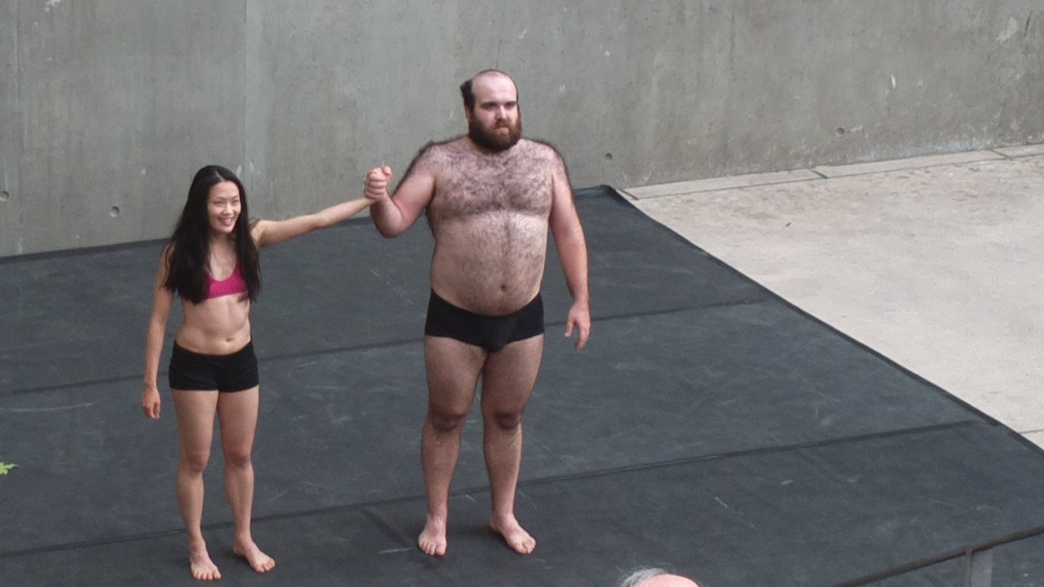 « Religieuse à la fraise ». Conception et interprétation : Kaori Ito, Olivier Martin-Salvan.